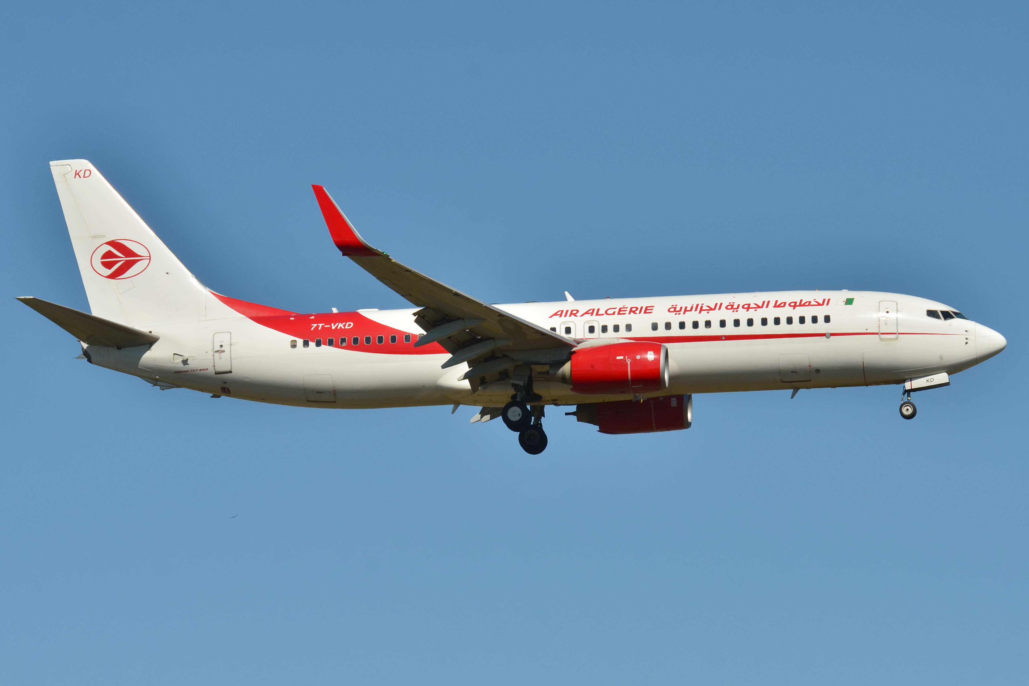 Photo prise à l'aéroport de Toulouse-Blagnac (LFBO) en France. Picture take at Toulouse-Blagnac Airport (LFBO) in France.